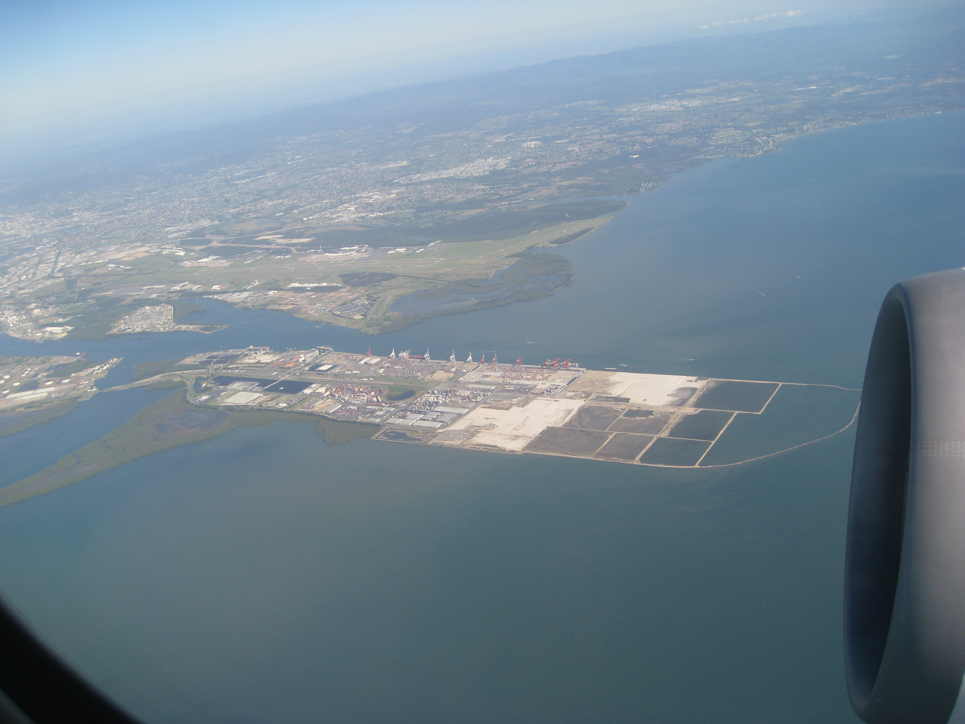 i09_0425 043